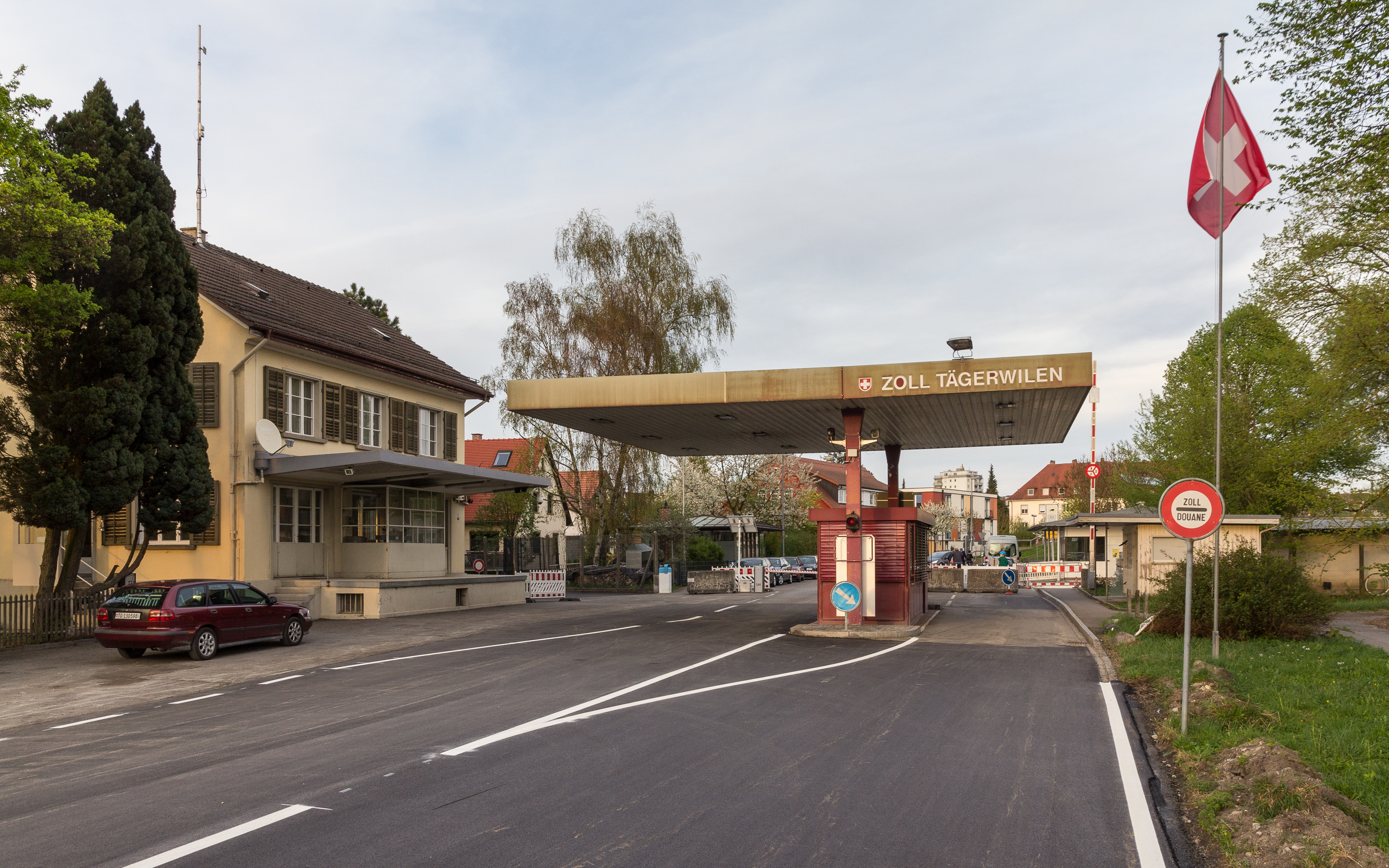 Wegen Leitungs- und Strassenbauarbeiten war der seit Jahren unbesetzte Zoll Tägerwilen bis zum 16. April 2017 gesperrt